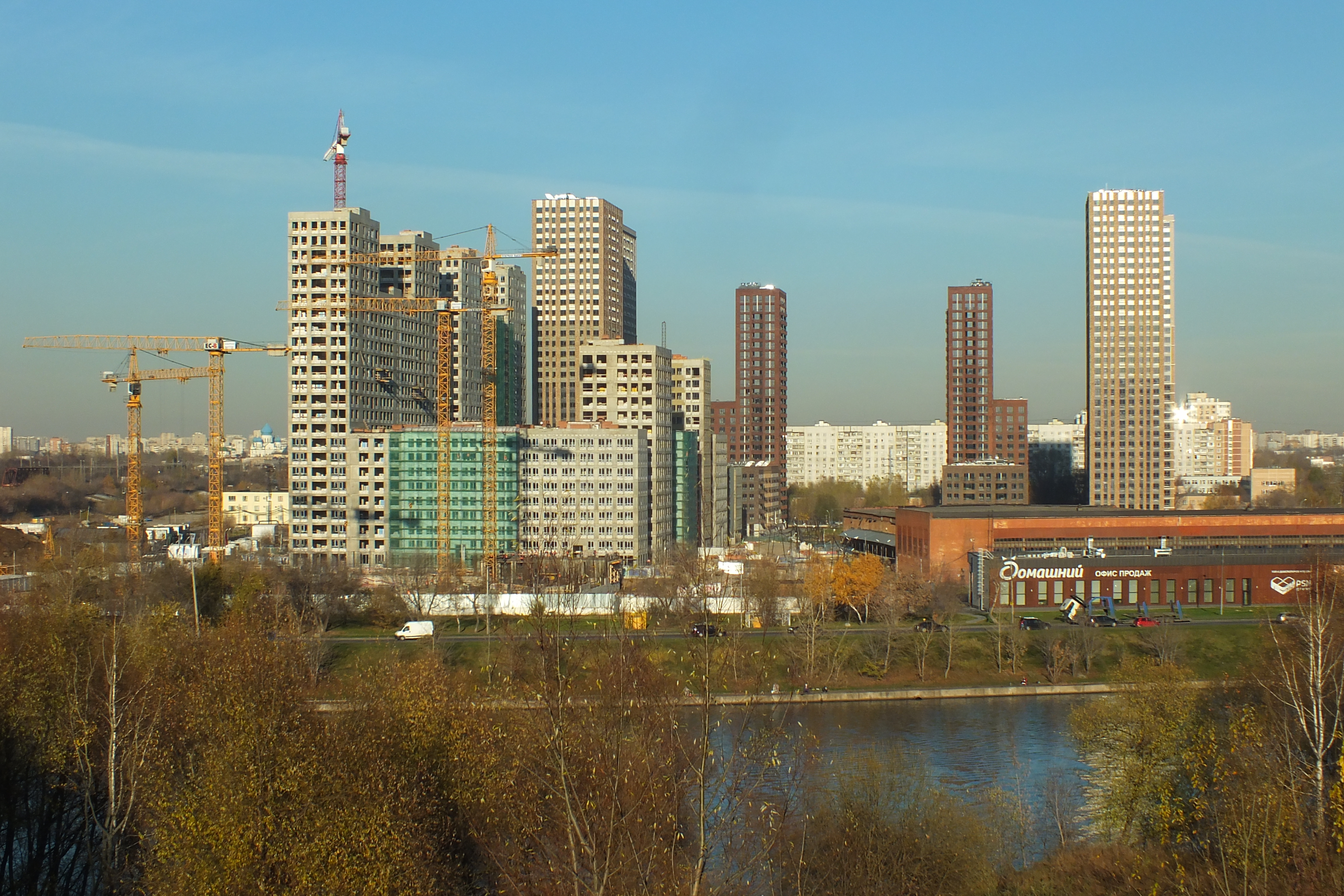 Строительство жилого комплекса «Домашний» в районе Марьино 5 ноября 2018 года. Фотография сделана с высокого берега в Сабурово (место рядом со школой)